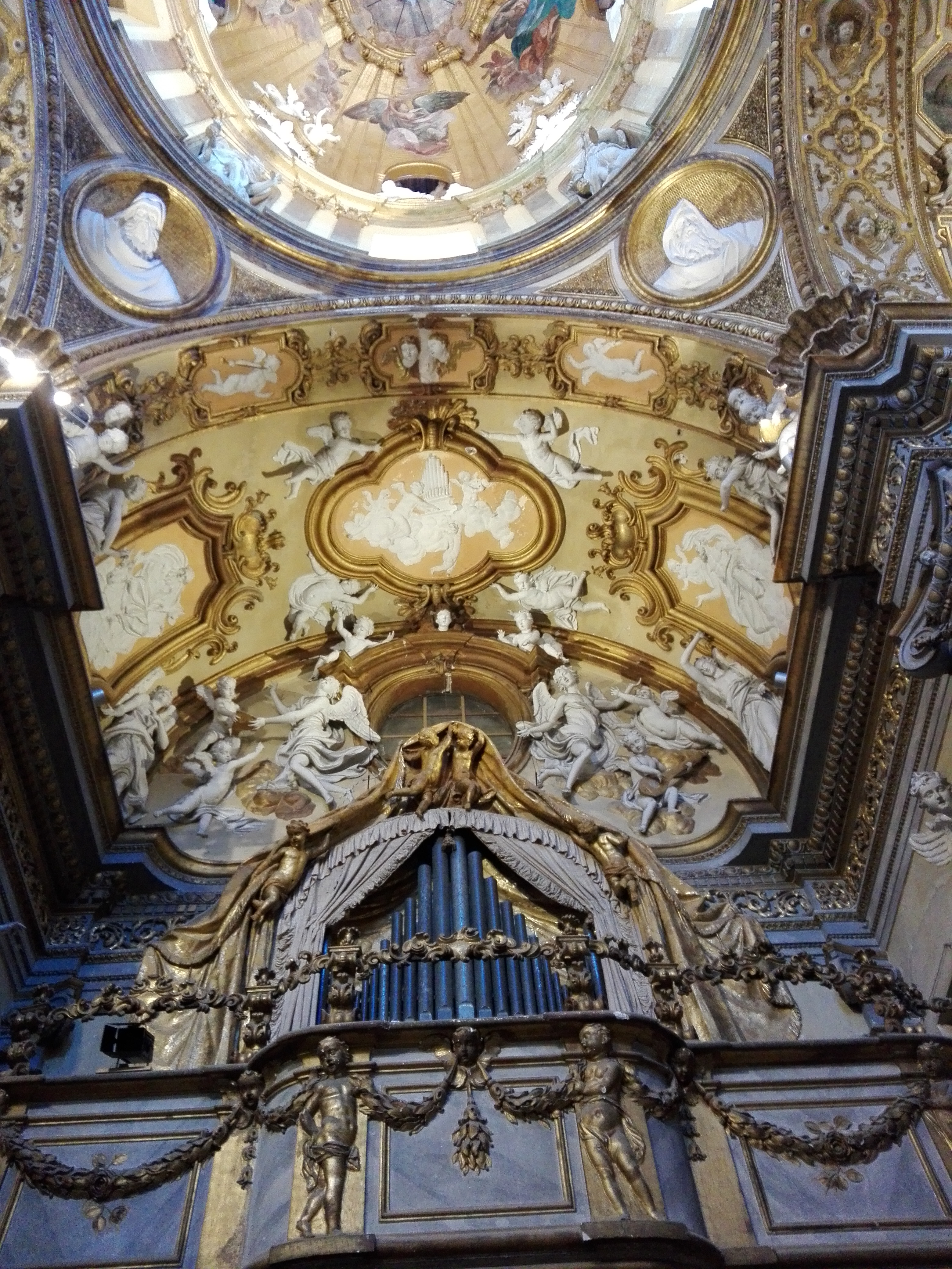 Chiesa